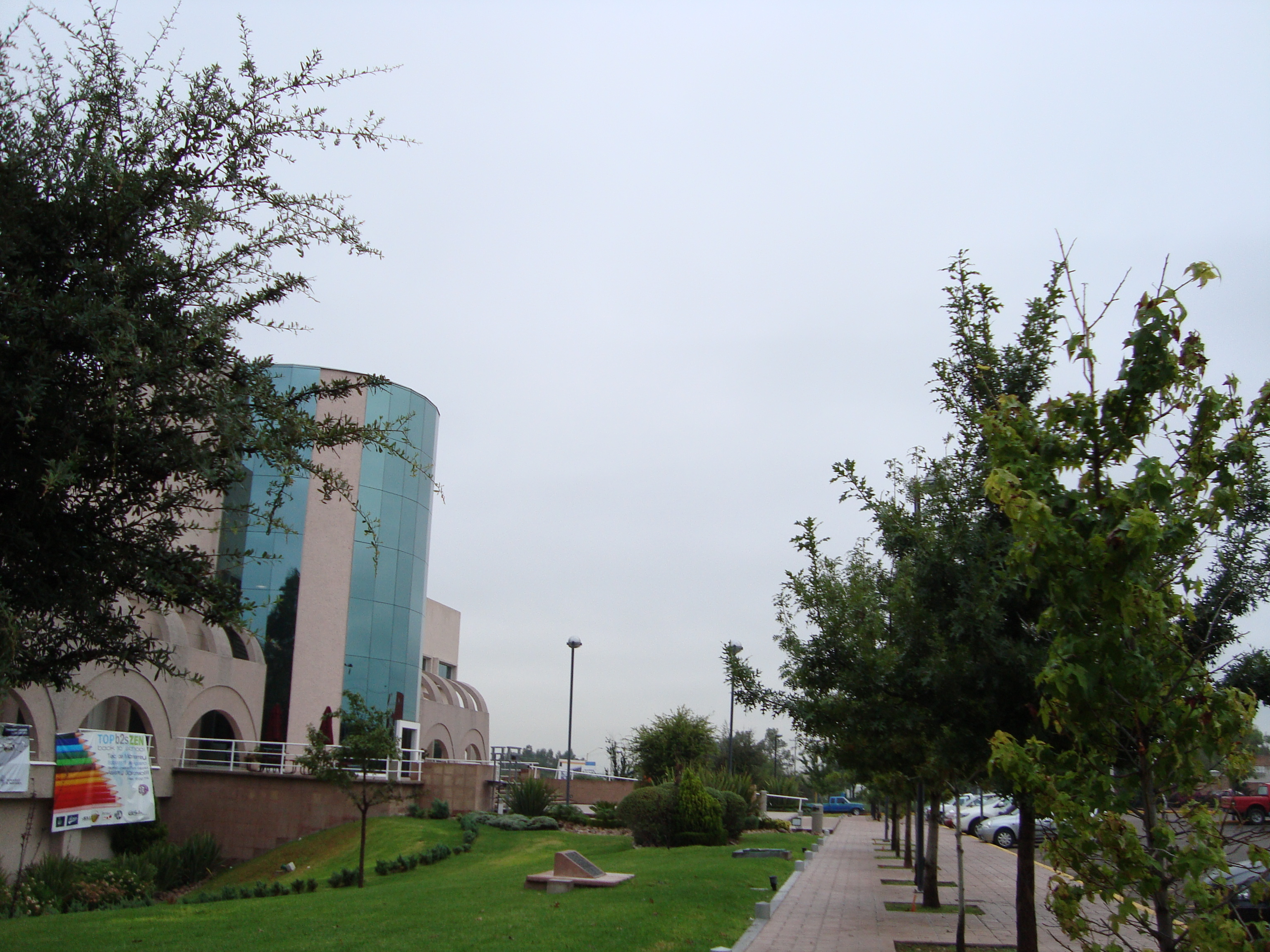 ITESM Aguascalientes